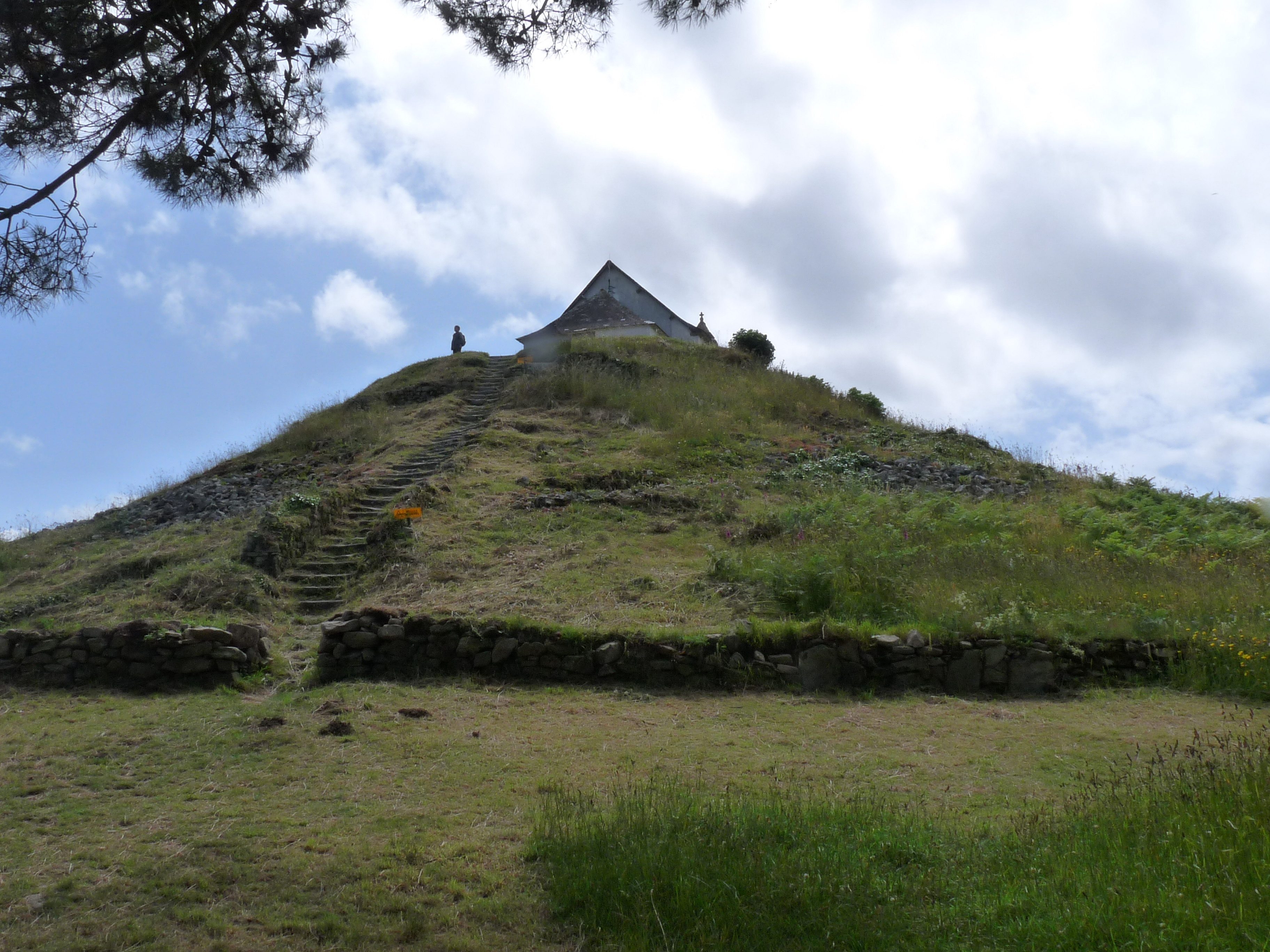 Tumulus Saint-Michel (Carnac, Morbihan)